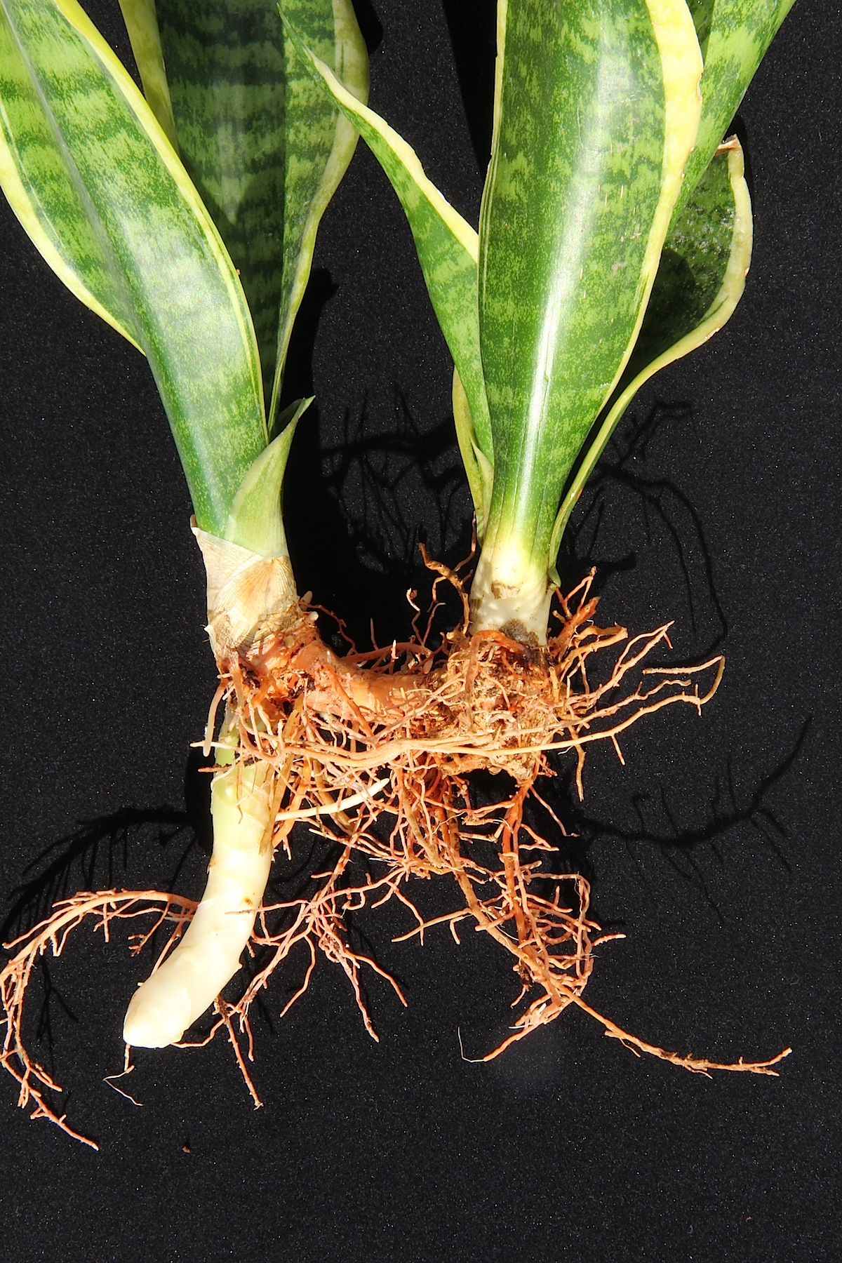 Sansevieria trifasciata (Rhizombildung)